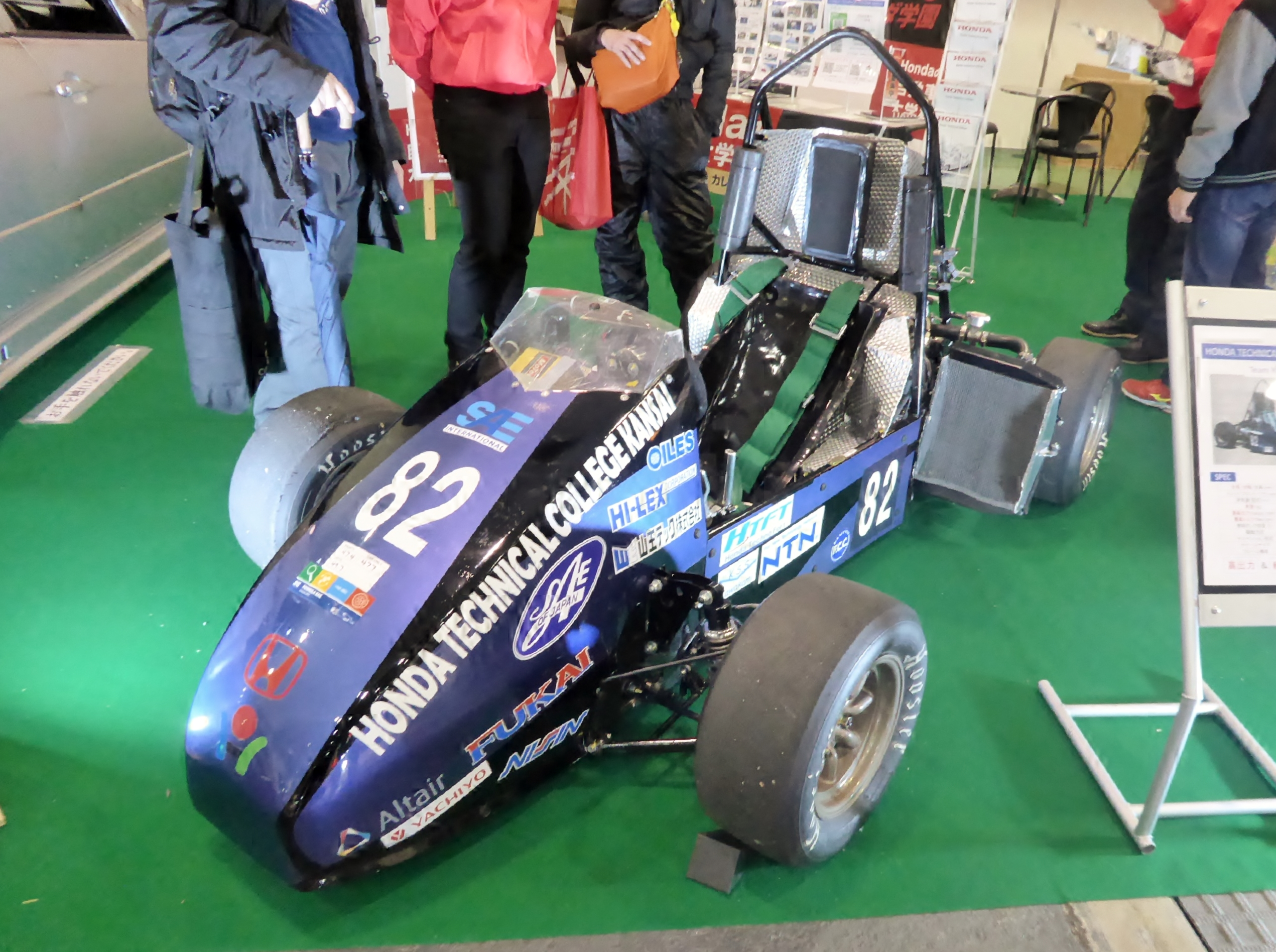 大阪オートメッセ2018に於いてホンダテクニカルカレッジ関西の学生フォーミュラ車両を撮影。